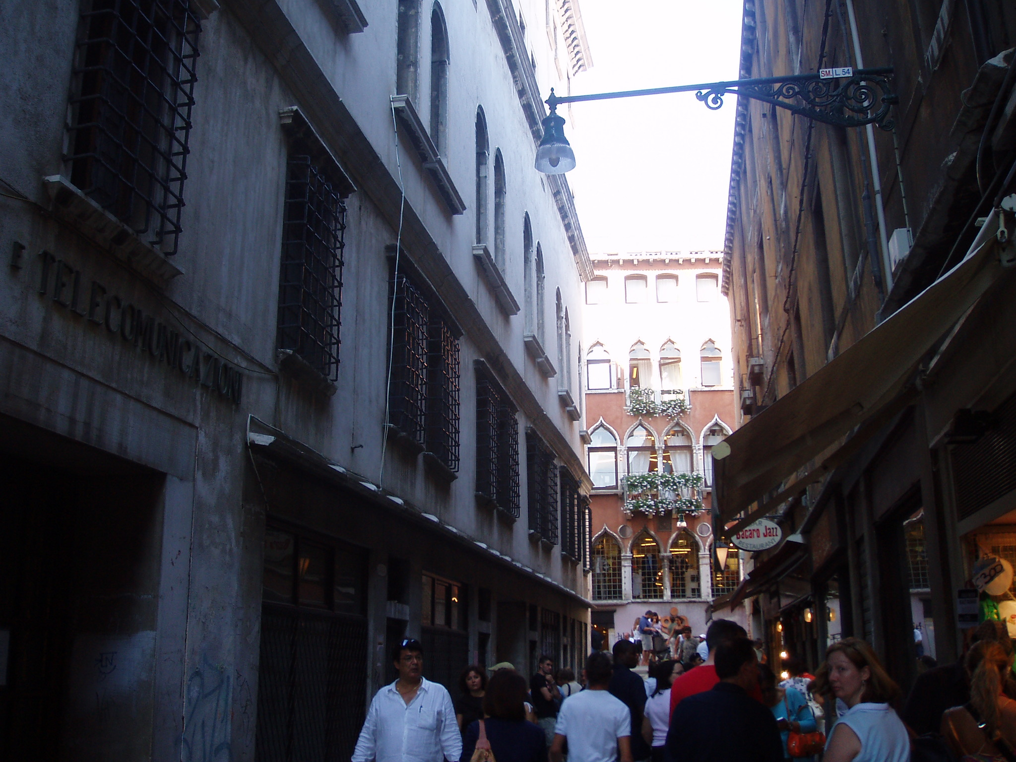 calle fontego dei tedeschi venise